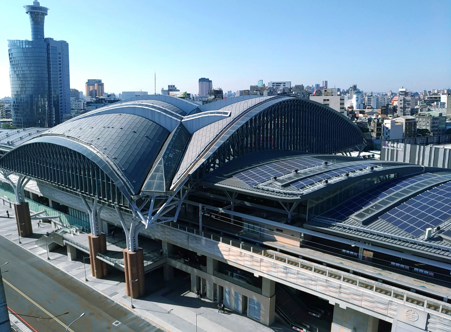 臺鐵臺中車站2018年10月全站啟用後，東站方向現況